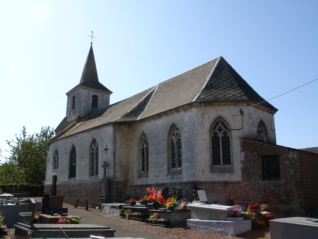 Église de Mencas